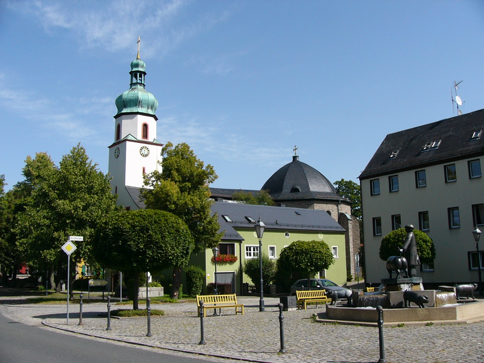 Baudenkmal in Oberkotzau